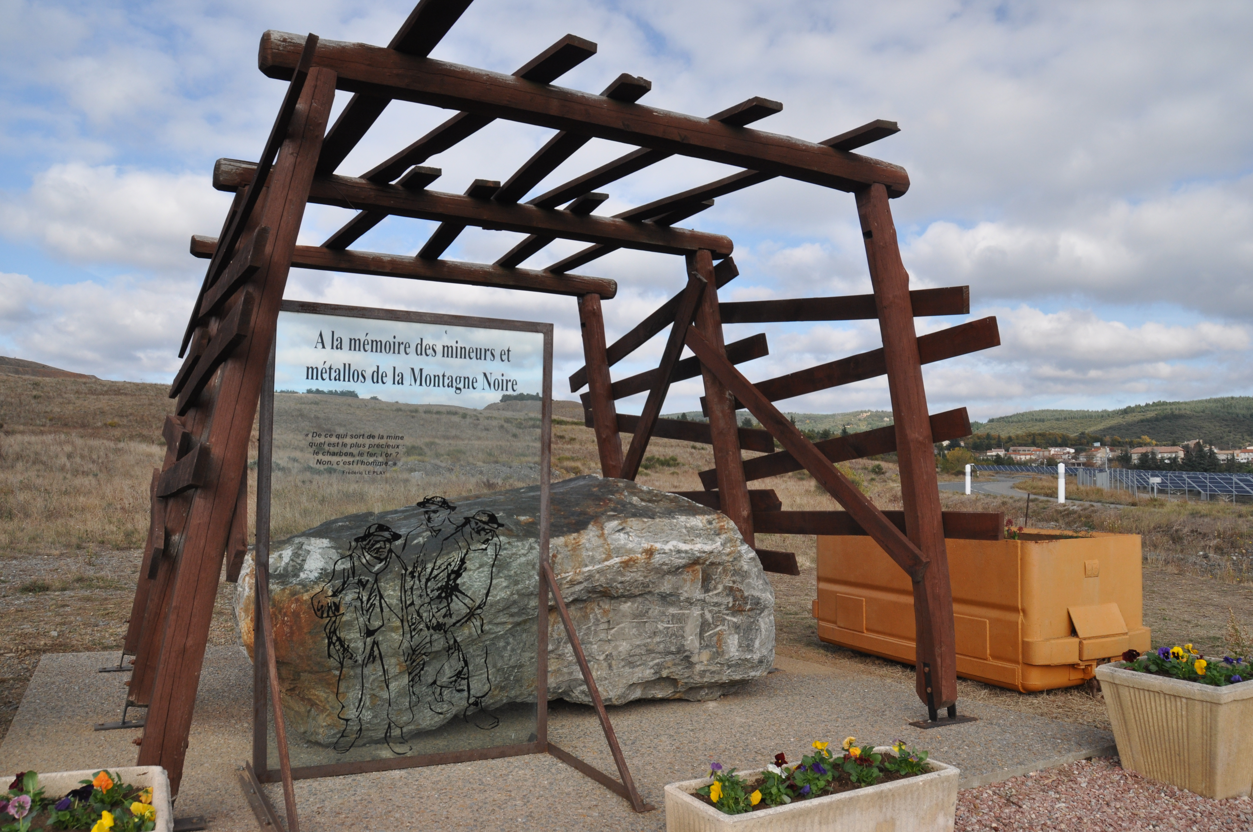 Monument dédié aux mineurs et métallos morts